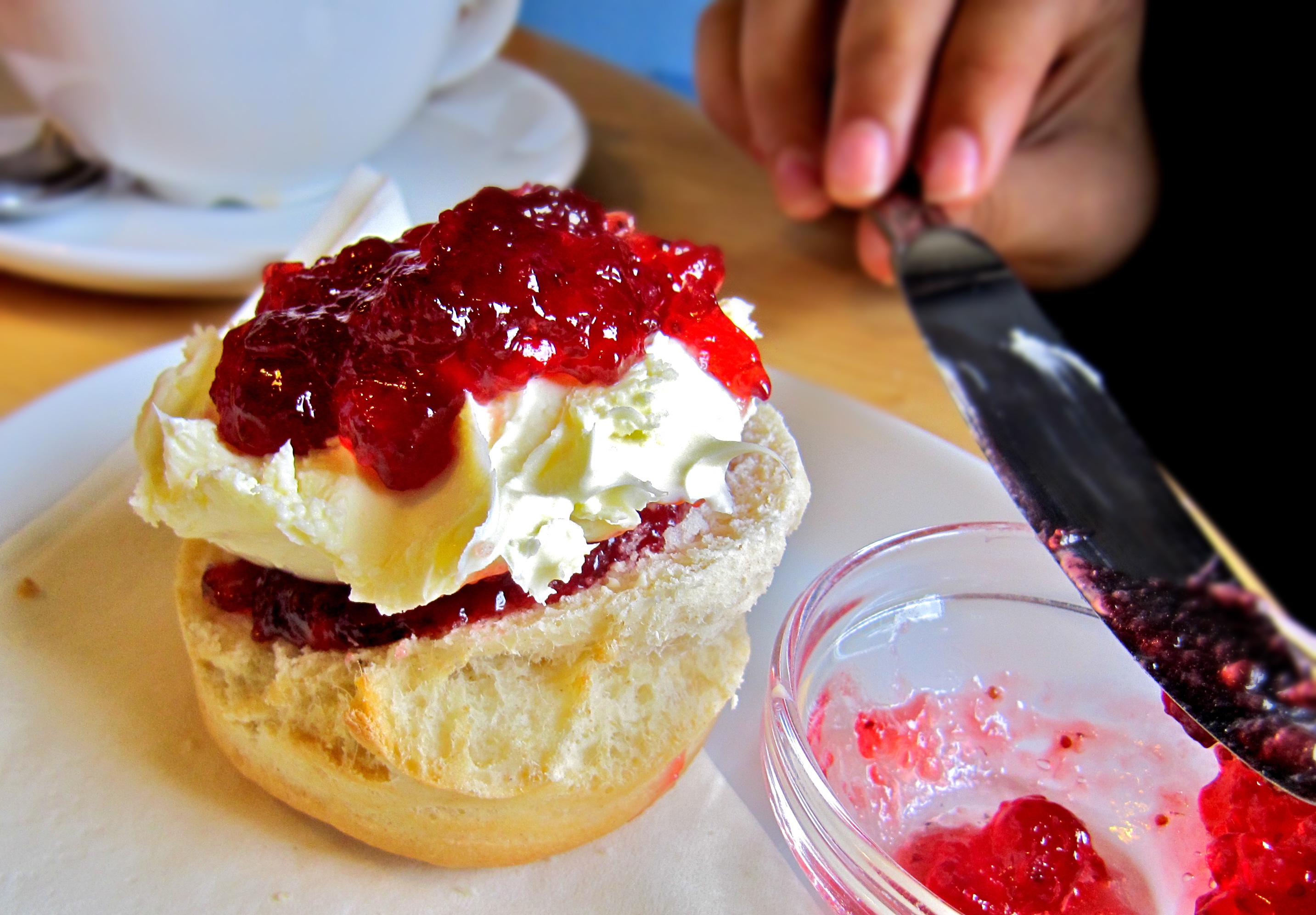 Scone mit Clotted Cream und Erdbeerkonfitüre. Von beidem viel.